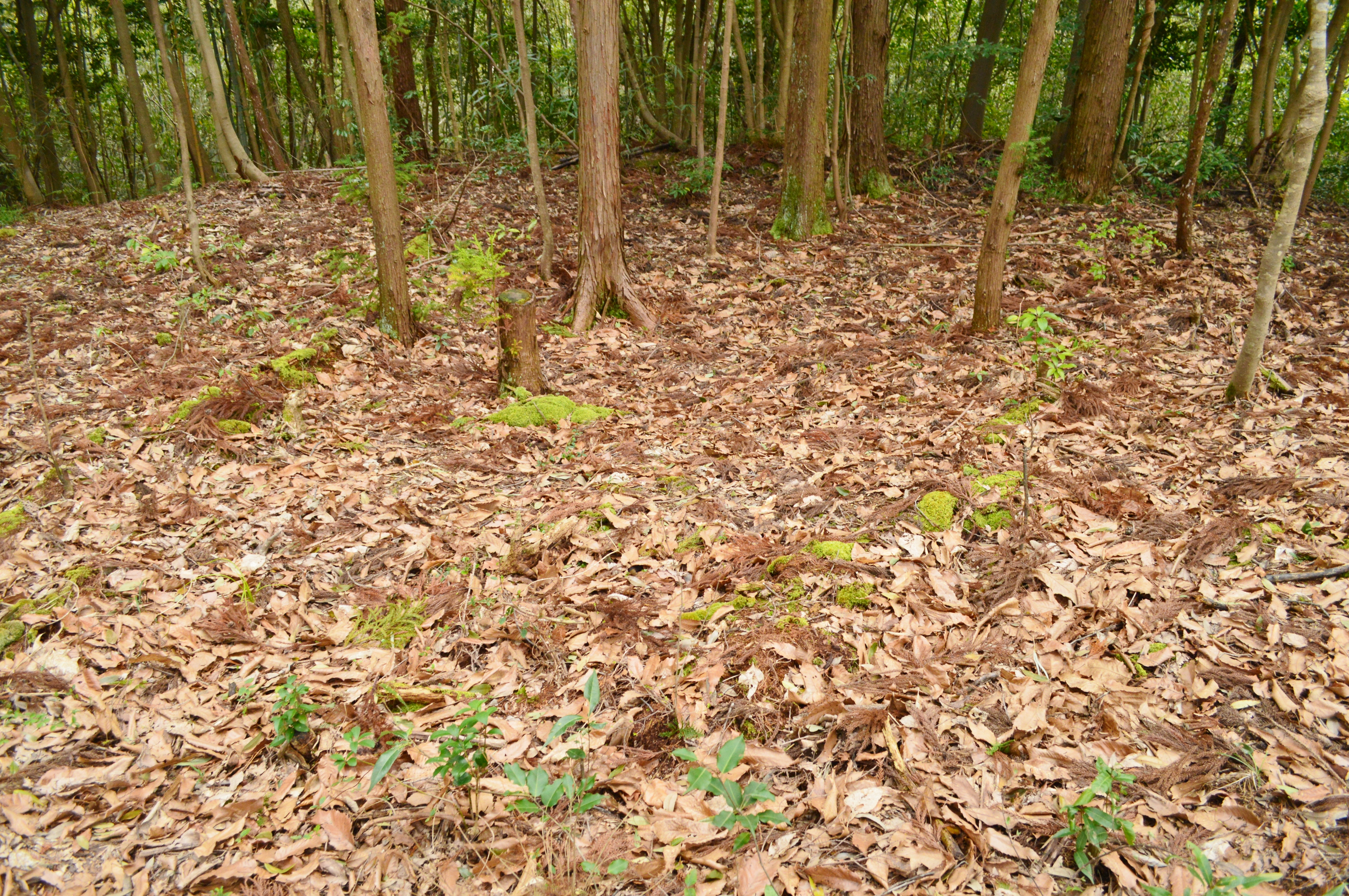 古郡家1号墳 後円部墳頂 Nikon D3200